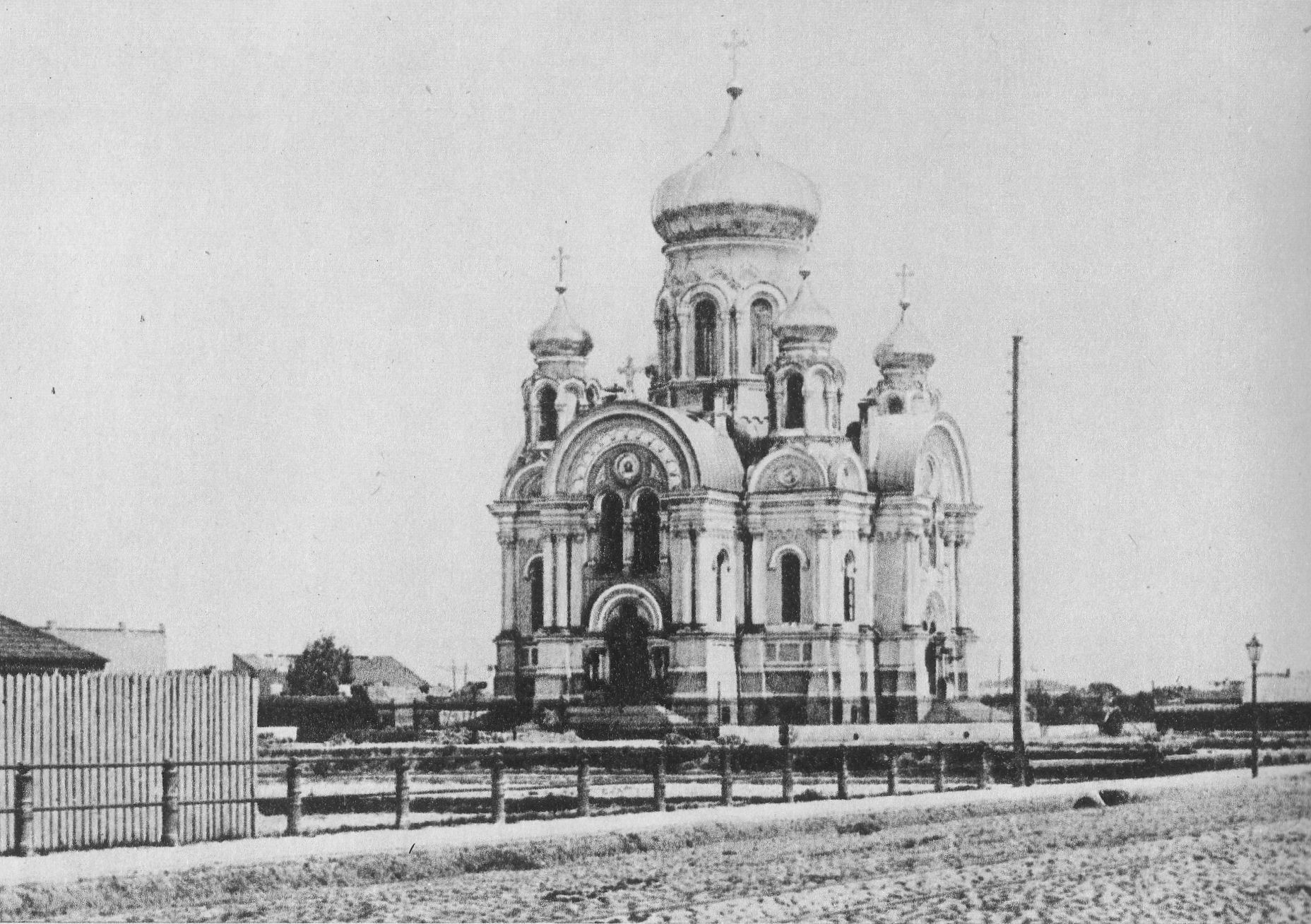 Cerkiew św. Marii Magdaleny na warszawskiej Pradze krotko po zakończeniu budowy